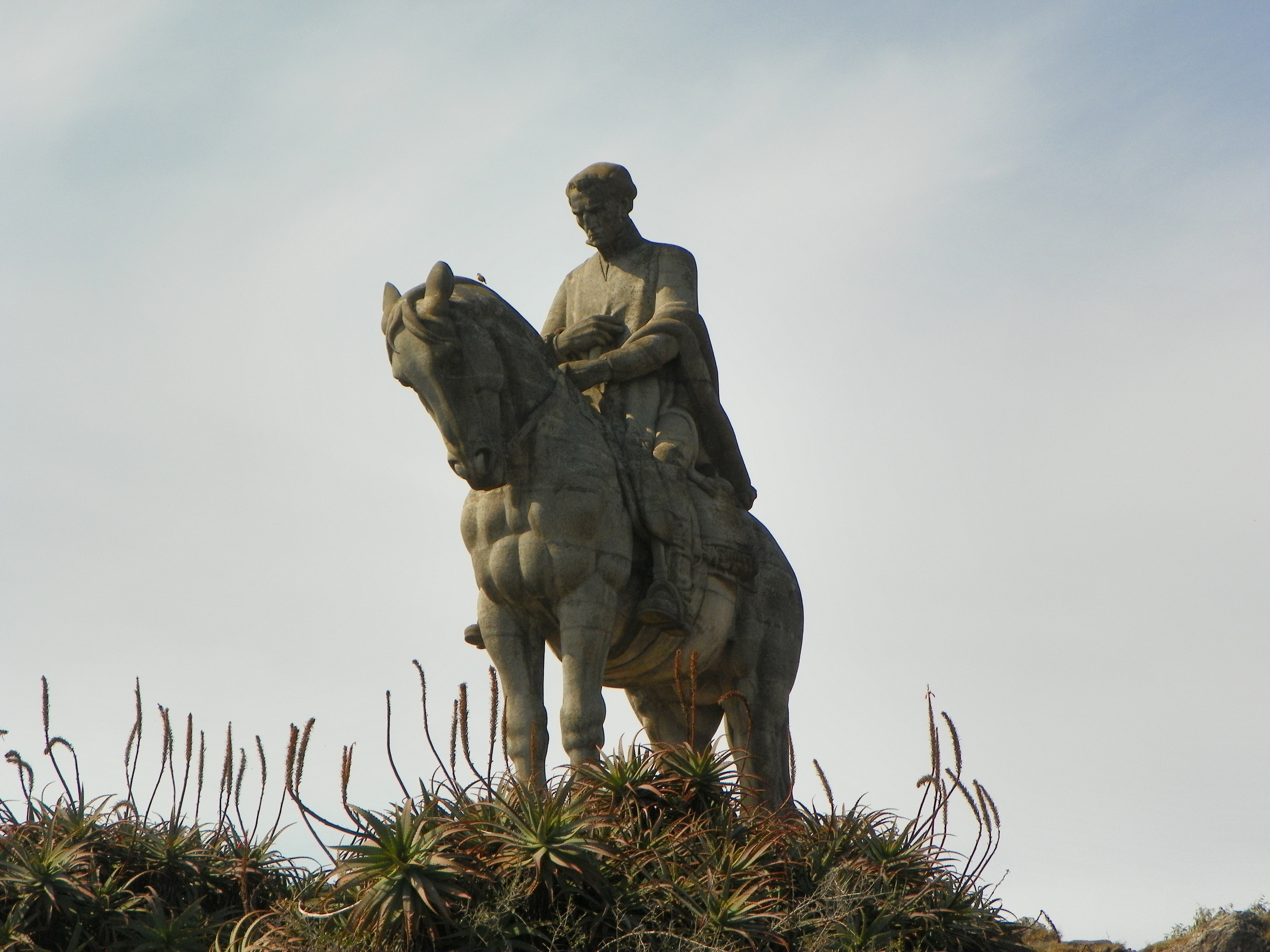 Monumento a Artigas (Cerro Ventura). Ubicada en el departamento de Lavalleja